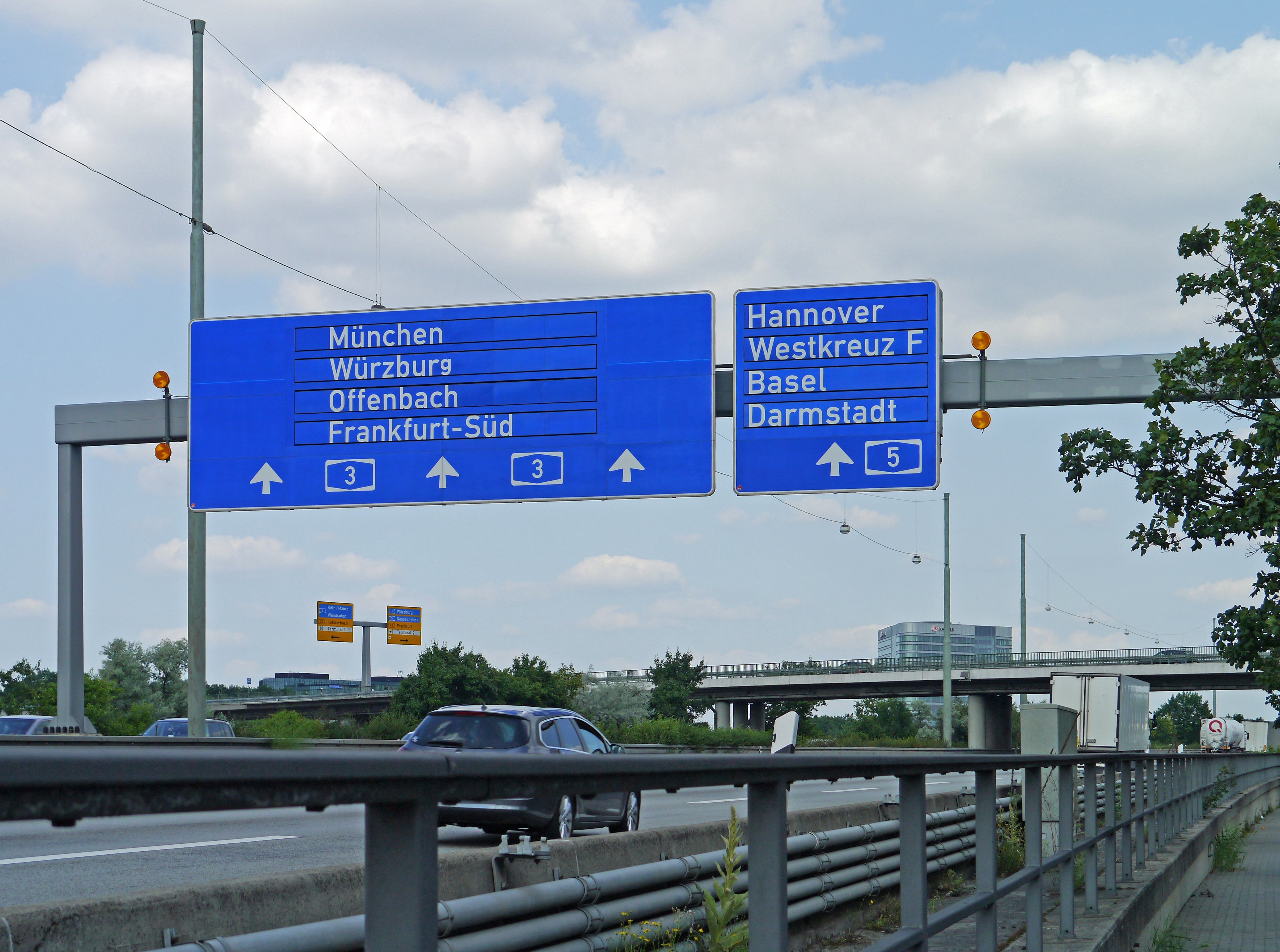 Wechsel-Wegweiser-Schilderbrücke, an der A 3 am Rhein-Main-Flughafen in Frankfurt am Main.